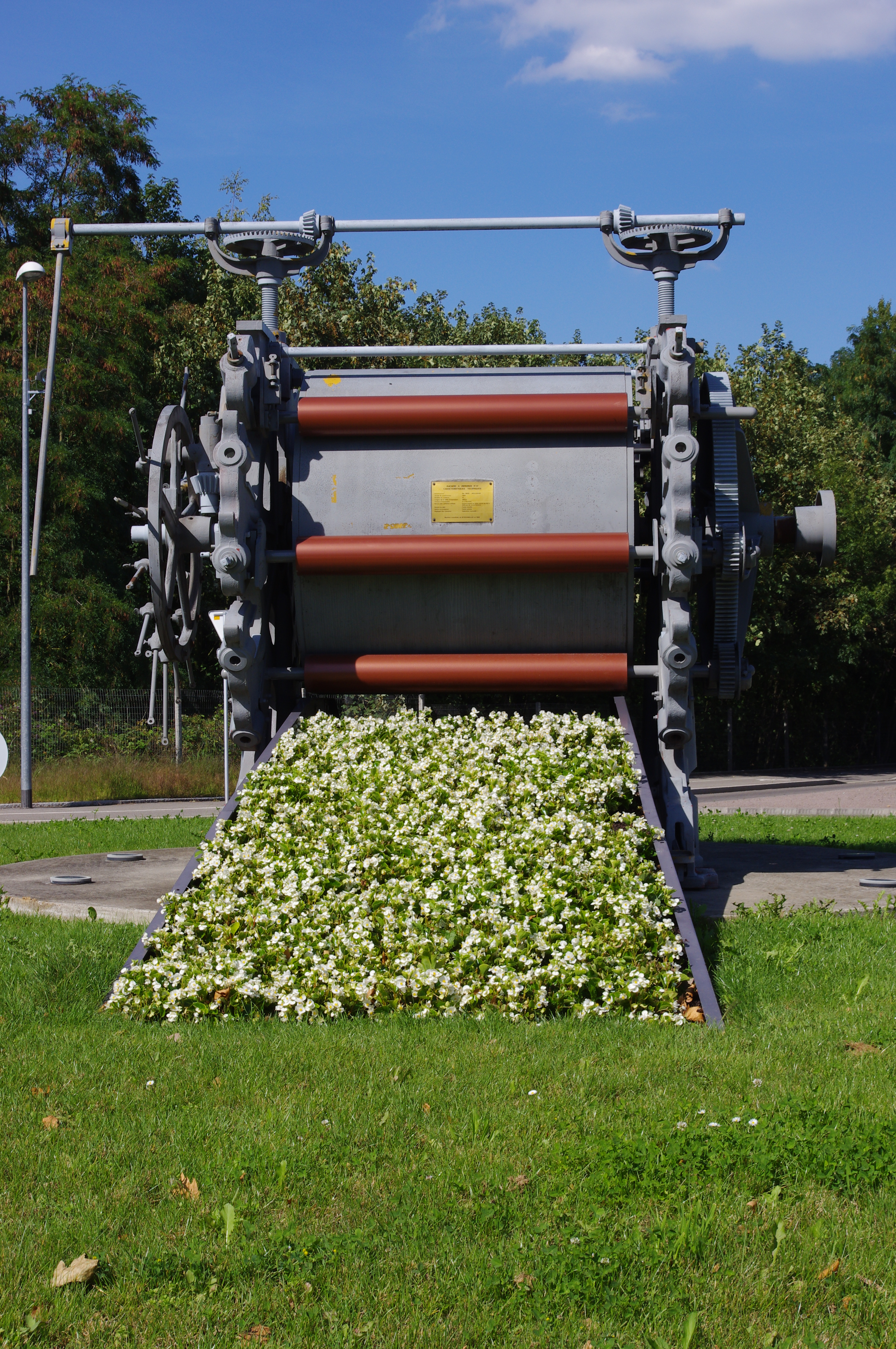 un des rares vestiges de l'industrie textile de Pfastatt